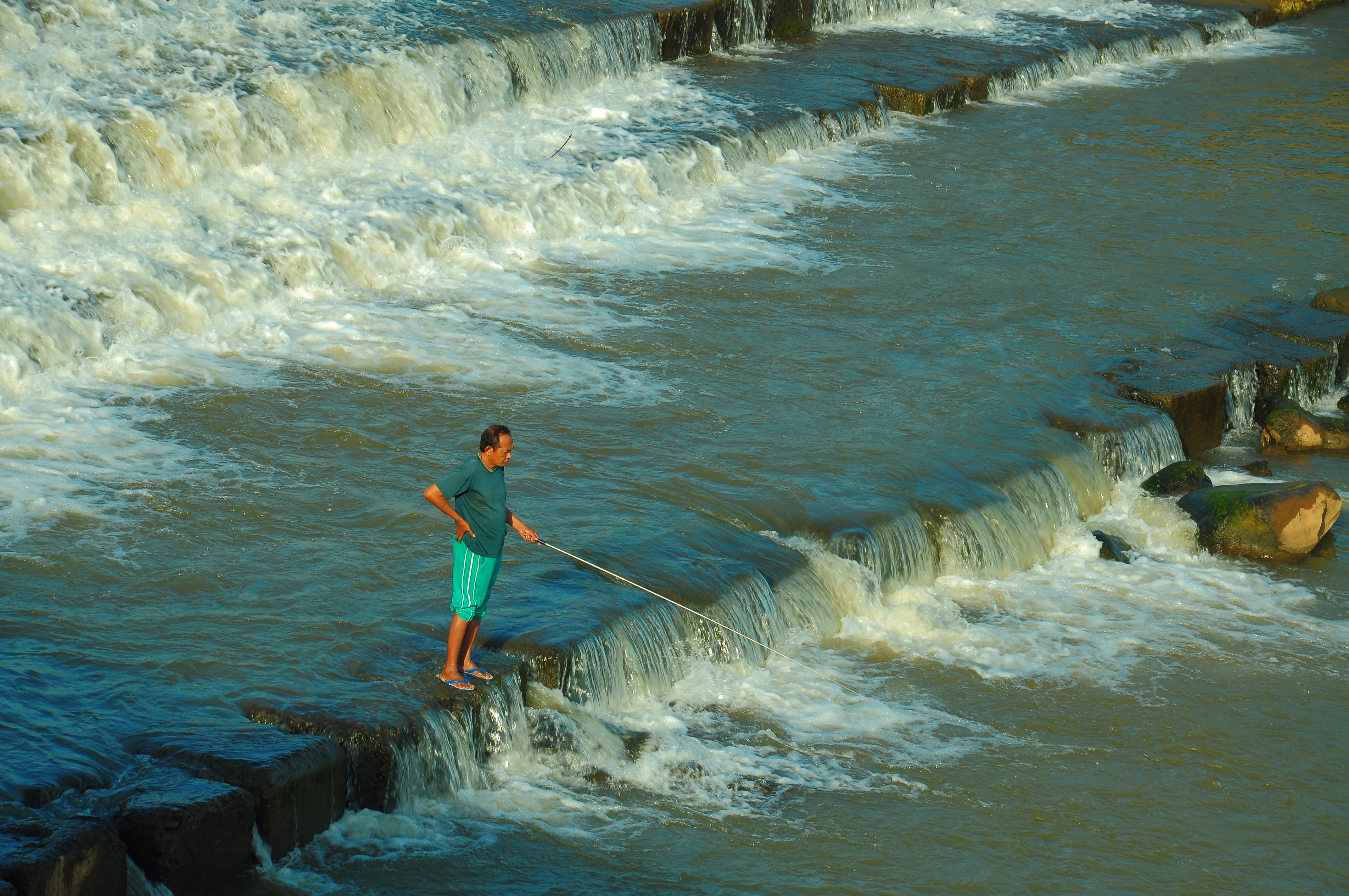 Seorang pemancing ikan memancing di tengah Kali Kuto, Desa Sambongsari, Weleri, Kendal, Jawa Tengah, Indonesia saat air sungai surut.